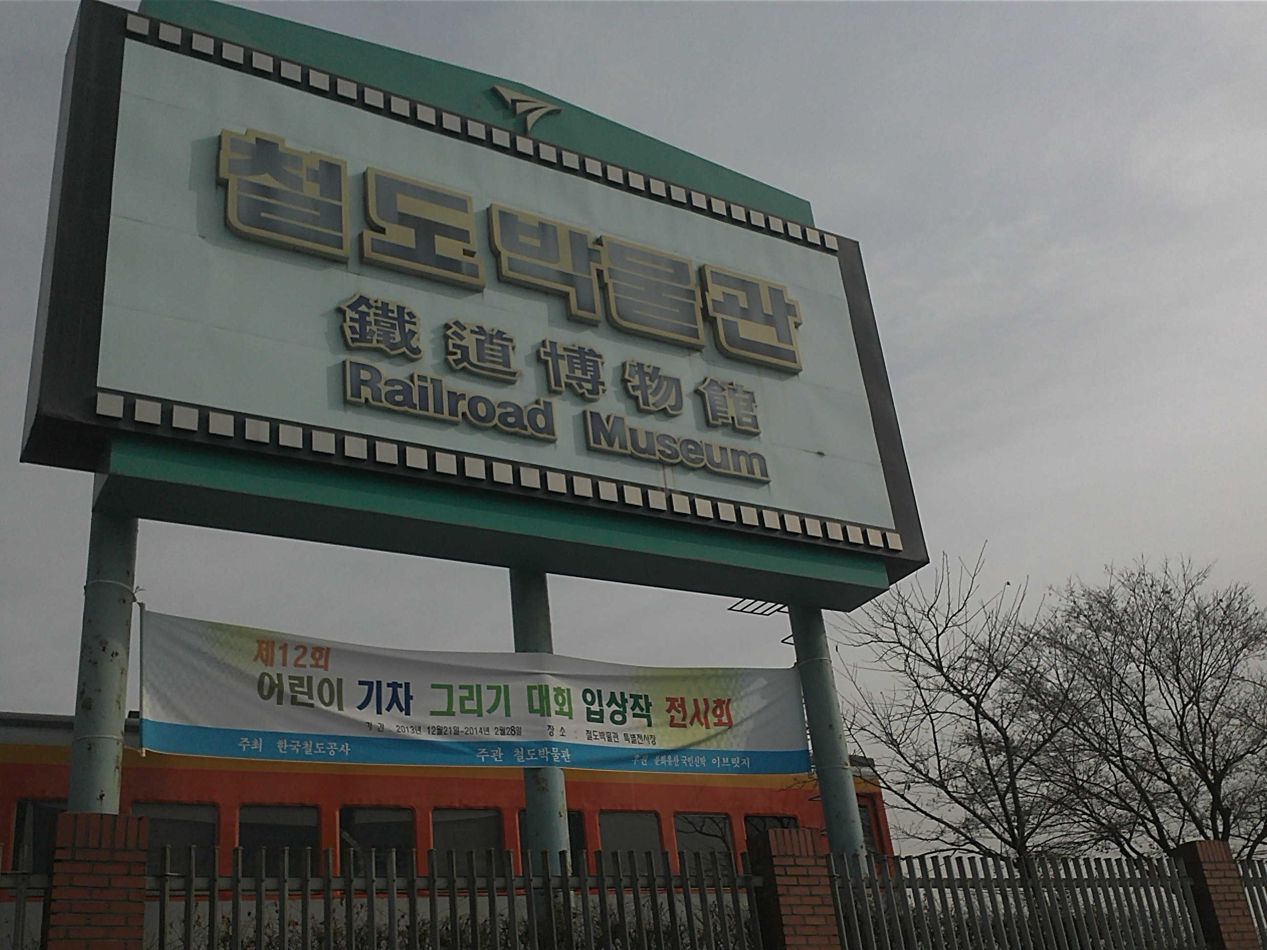 철도박물관 입구에 위치한 표지판 모습입니다.